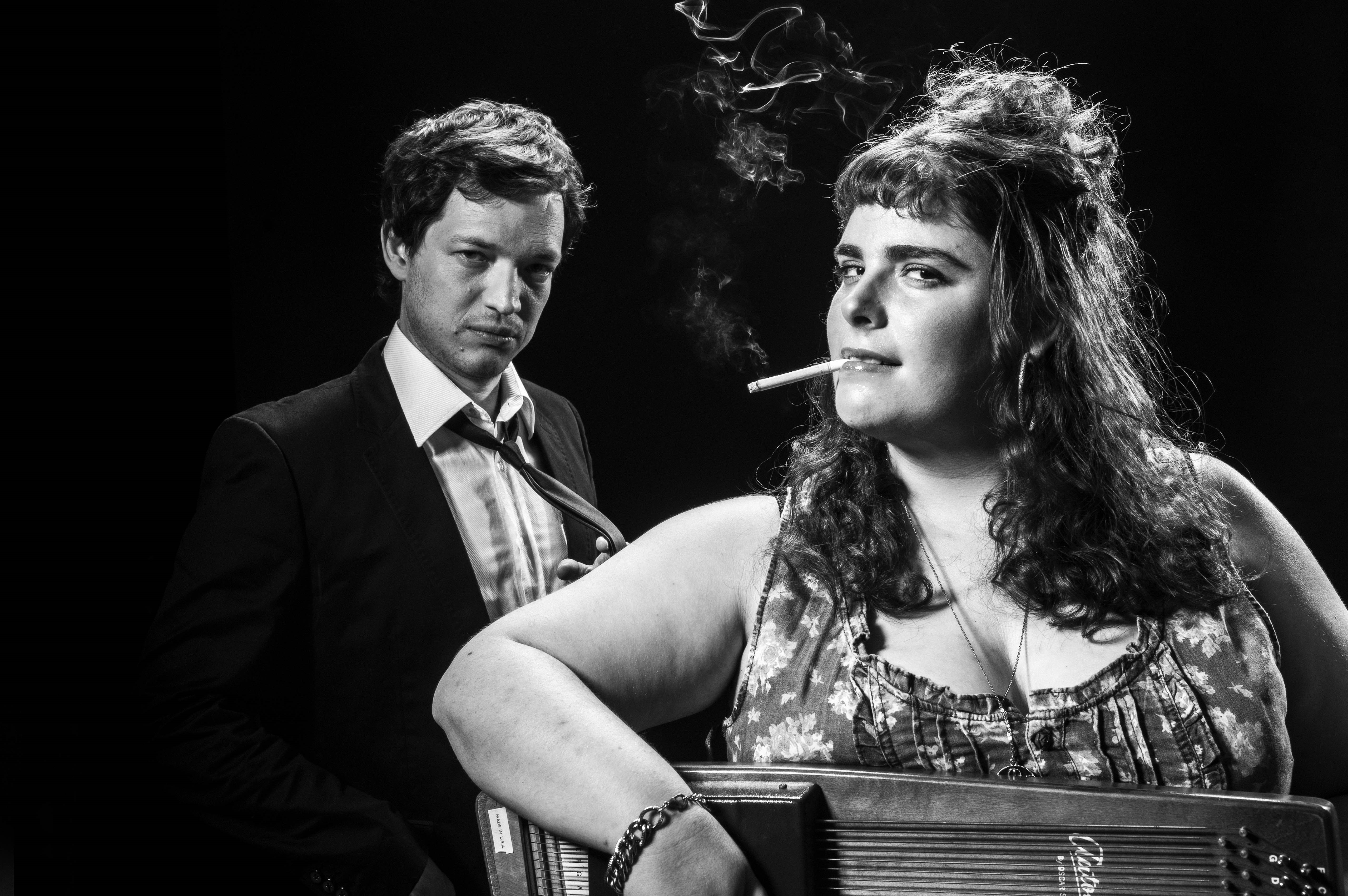 שירים מהבידיבום